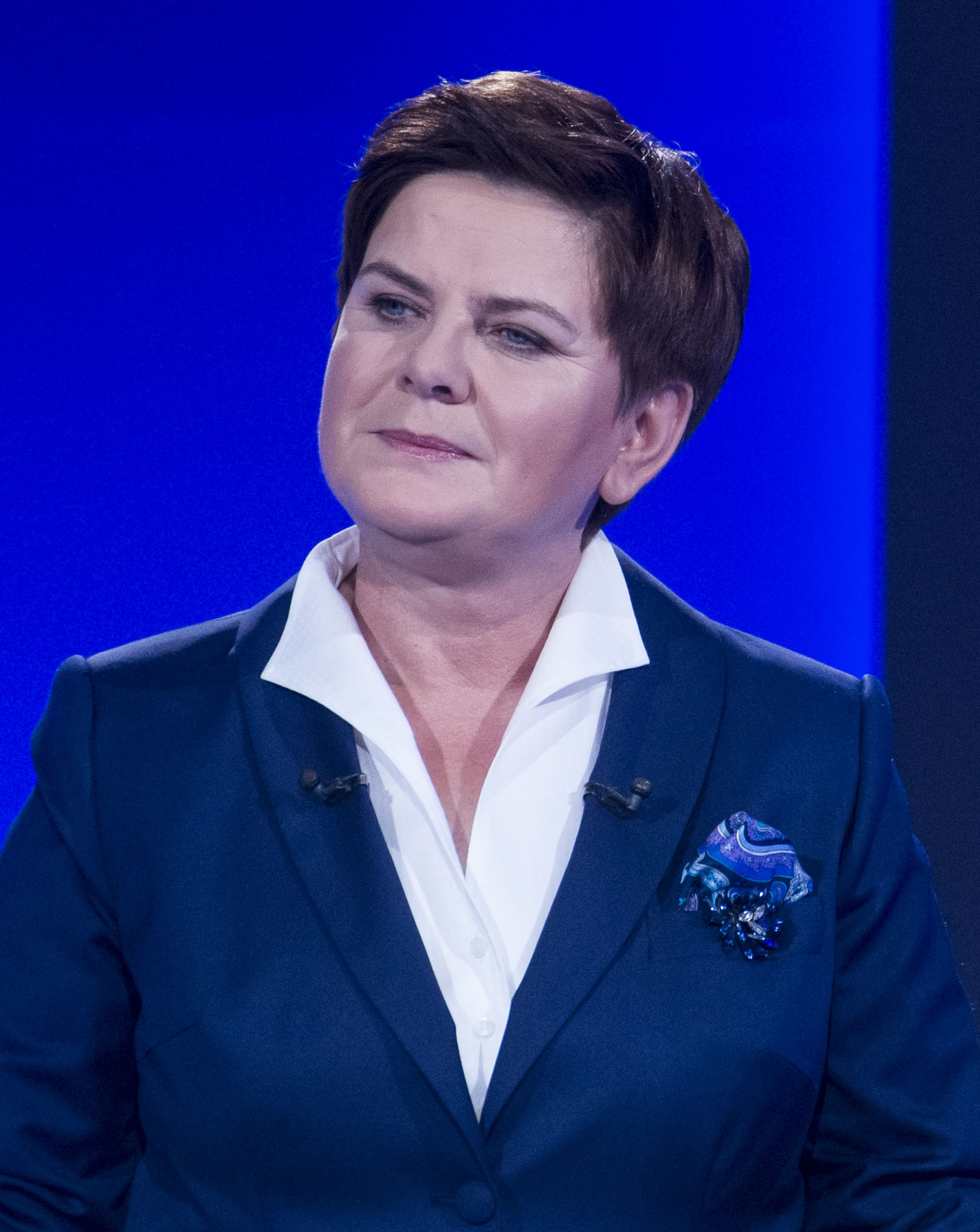 "Rozmowa o Polsce" - debata Premier Ewy Kopacz z Beatą Szydło, 19.10.2015